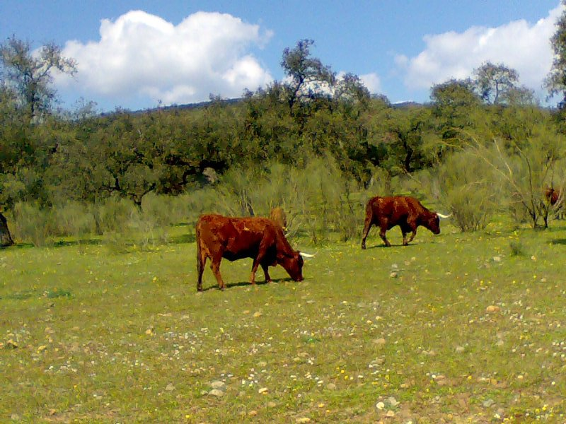 Vacas pastando en uan dehesa andaluza